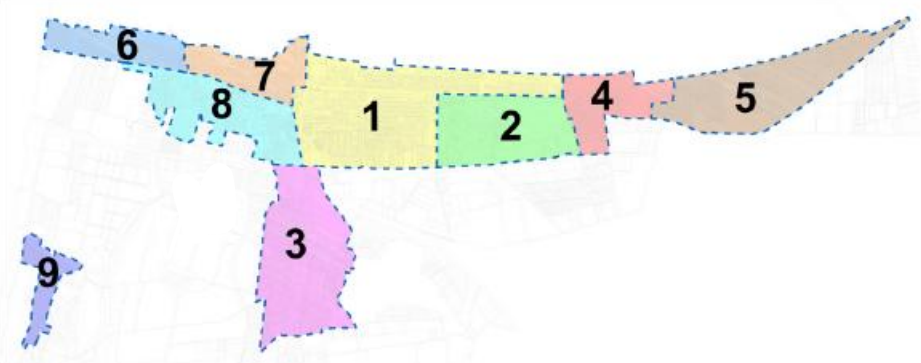 Siófok városnak a városrészei találhatók meg ezen a képen